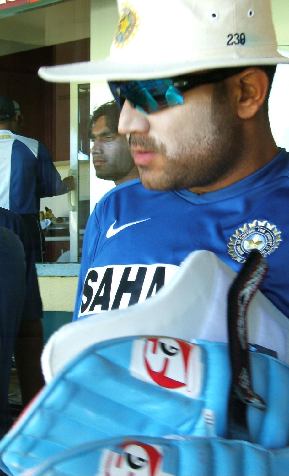 Virender Sehwag fielding at Adelaide Oval